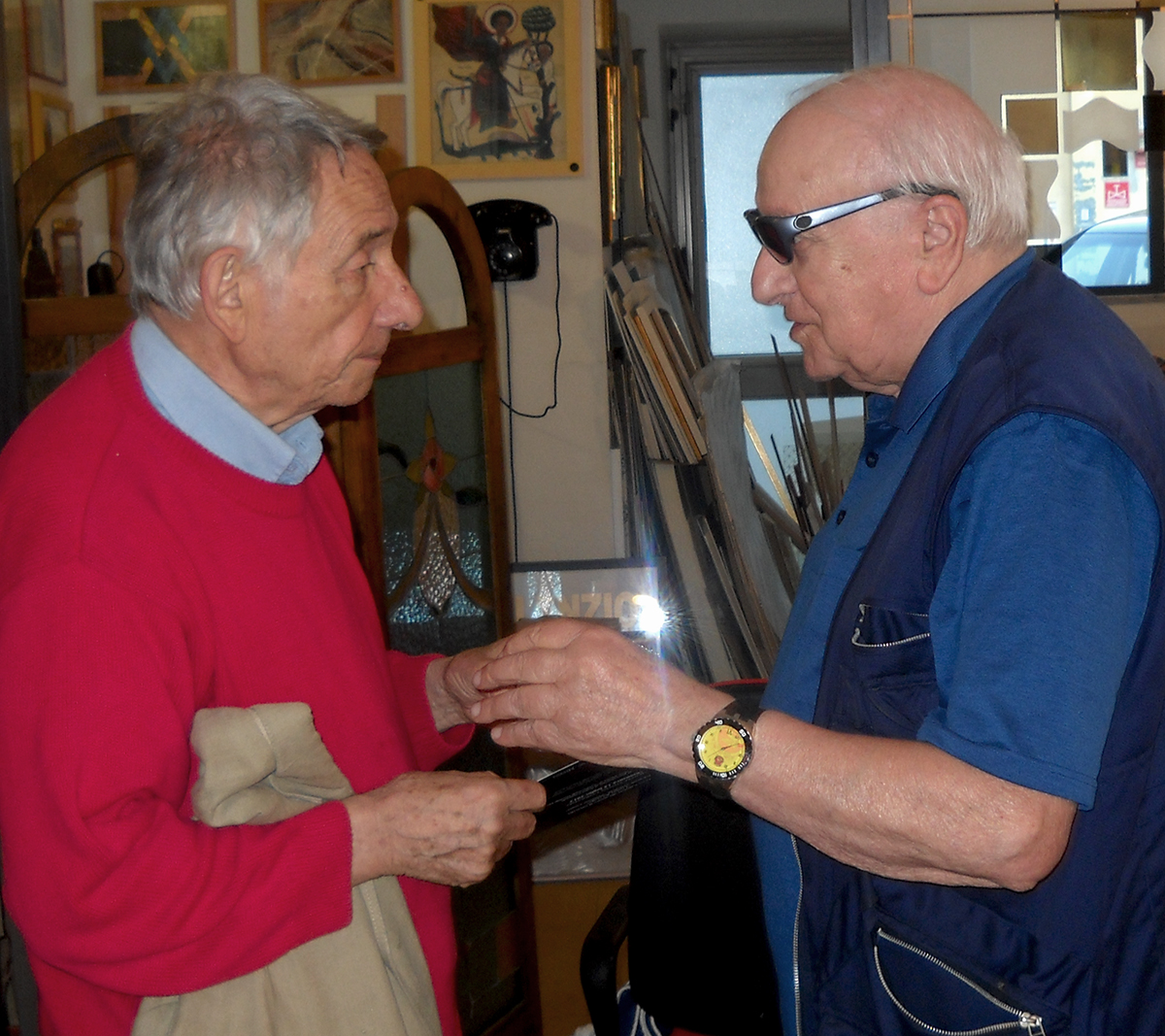 Mario Dondero e Eriberto Guidi. Foto scattata nell'atelier d'Arte di Eleonora Paniconi a Porto San Giorgio.